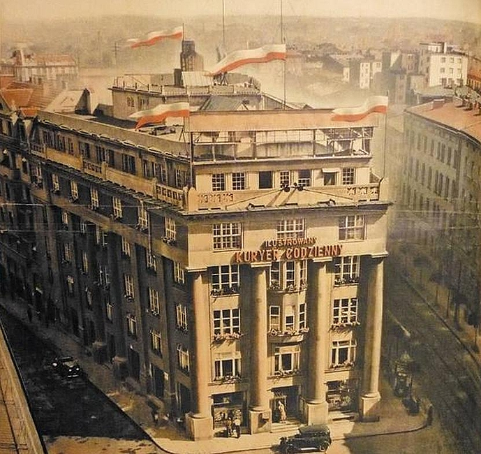 Siedziba koncernu, Pałac Prasy przy Wielopolu. przed wojną